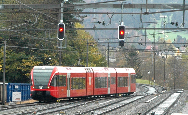 BLS trein RABe 526 282 (GTW 2/8) op 1 november 2006 te Moutier